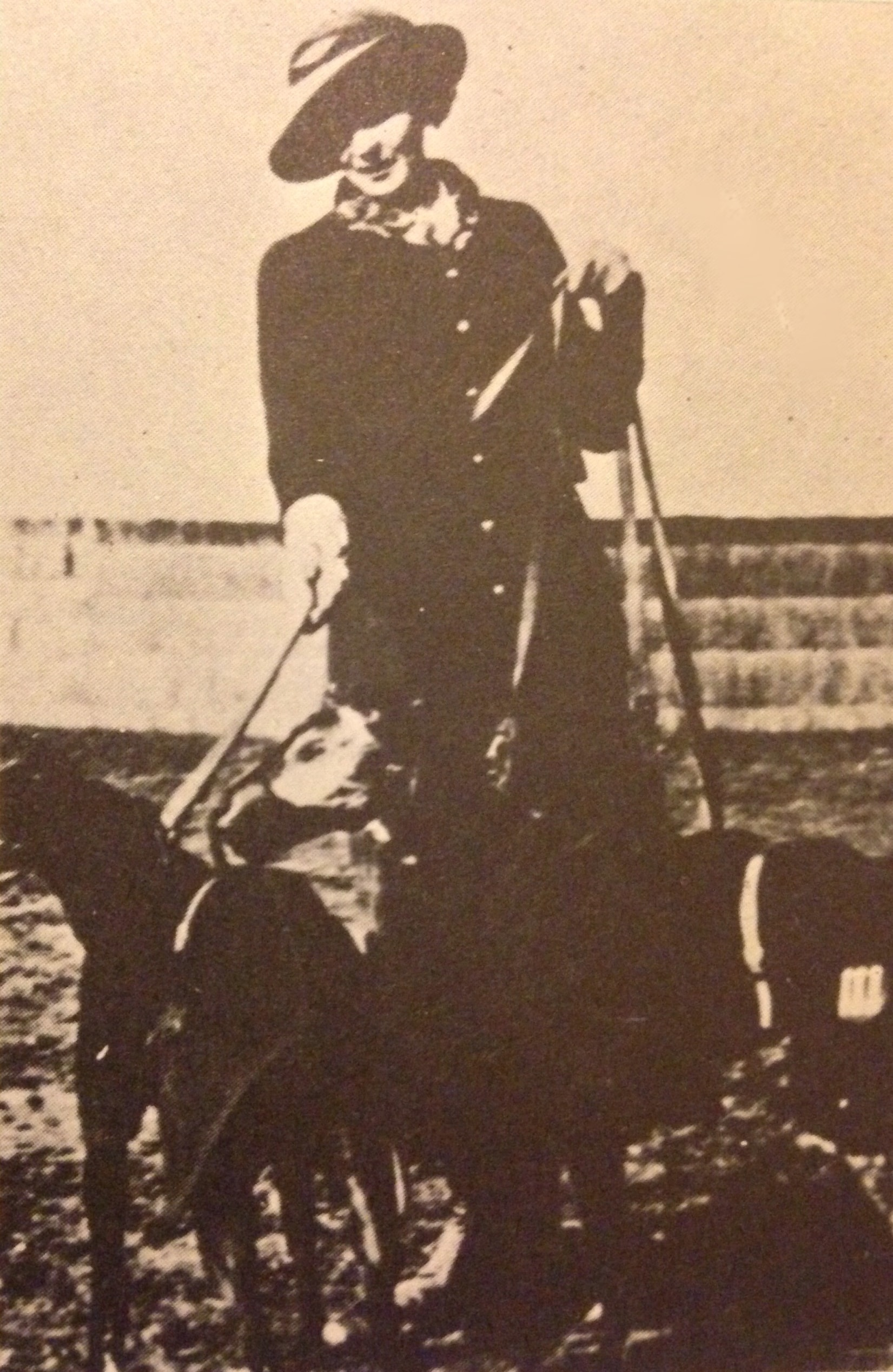 Nathalie de Goloubeff nella tenuta di Arcachon (1908-1914)